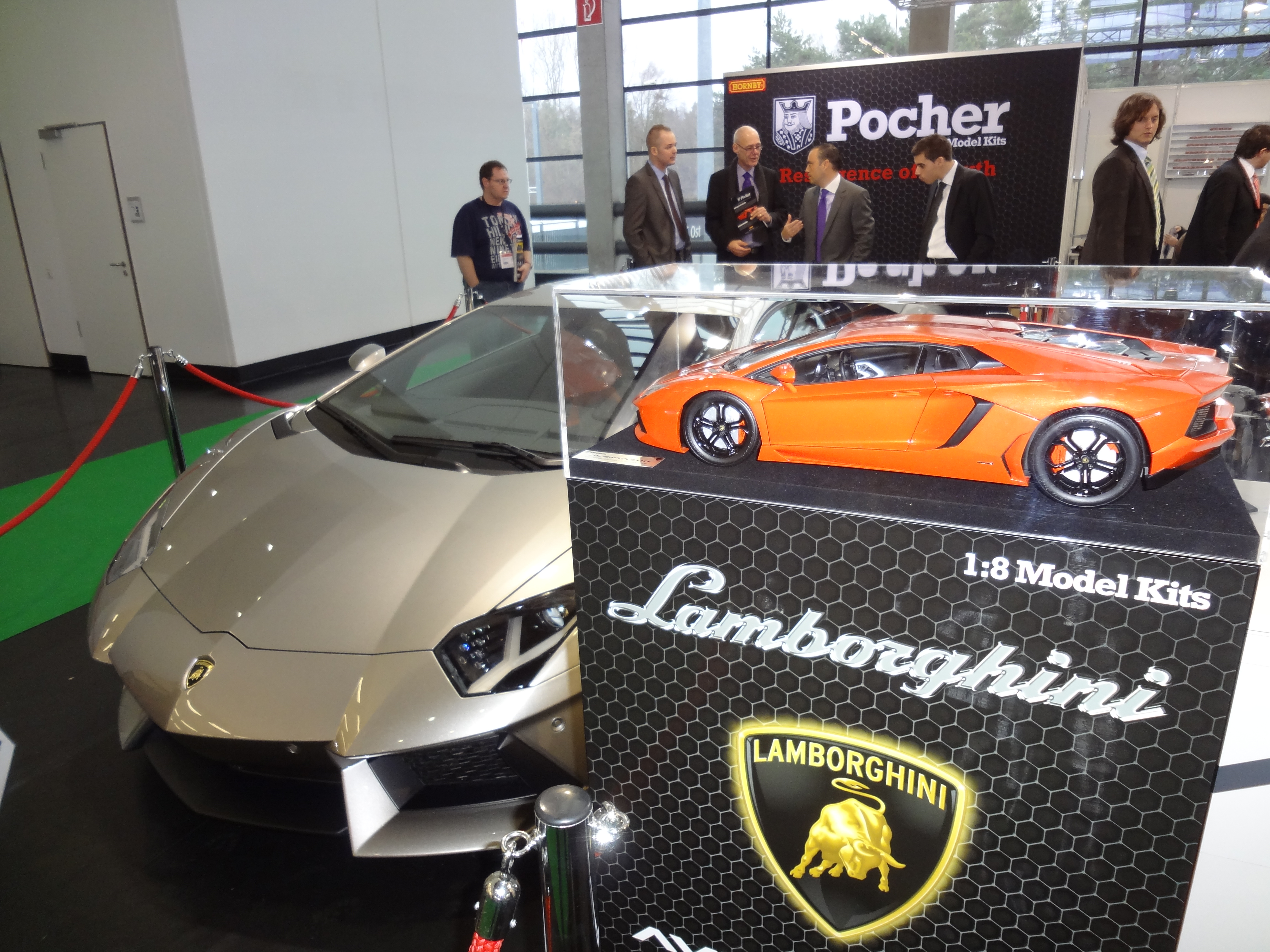 POCHER - Offizielle Vorstellung des neuen Lamborghini Aventadors als Modellbausatz im Maßstab 1:8 auf der Nürnberger Spielwarenmesse 2013